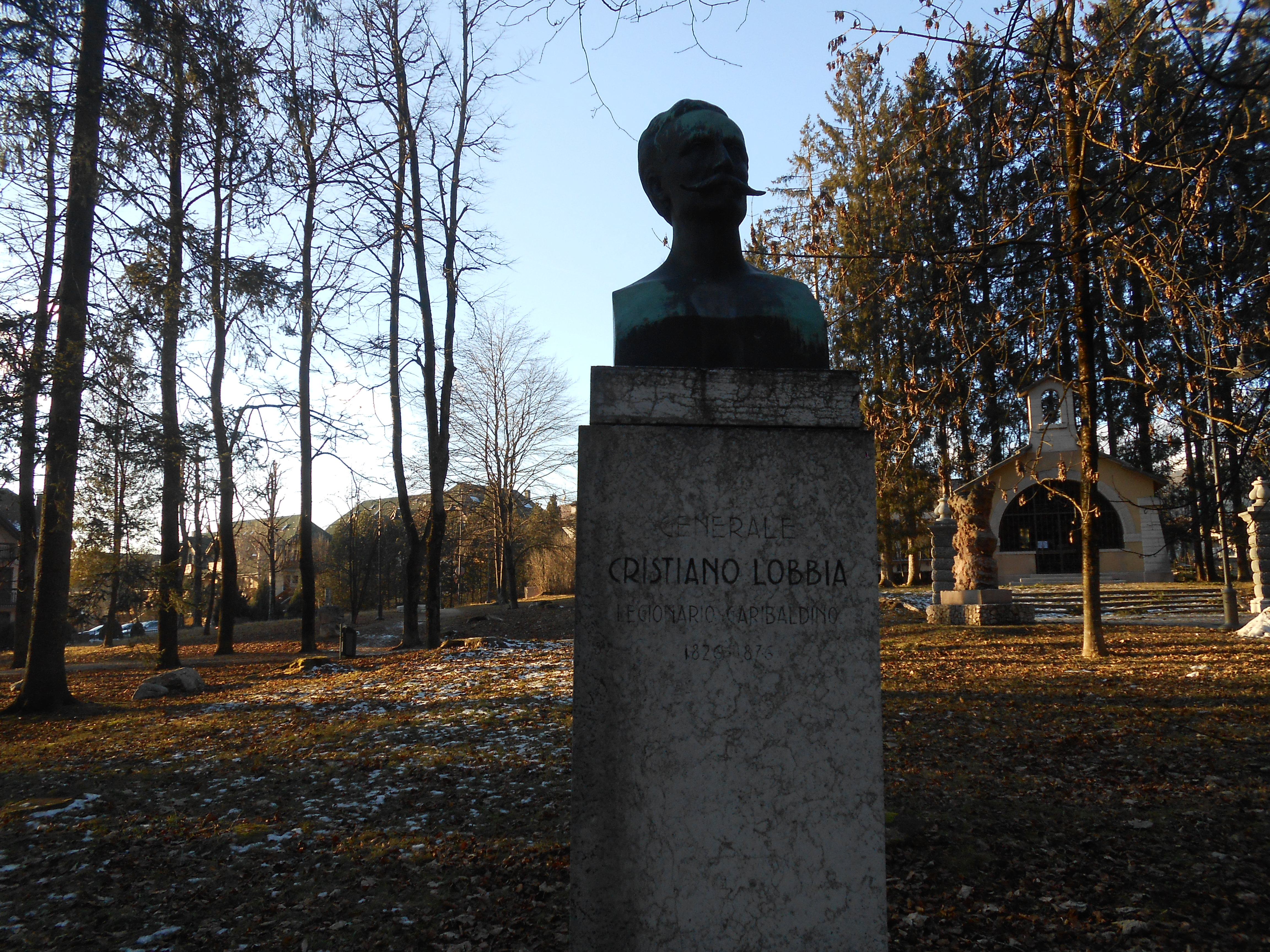 Monumento a Cristiano Lobbia nel parco della Rimembranza, Asiago